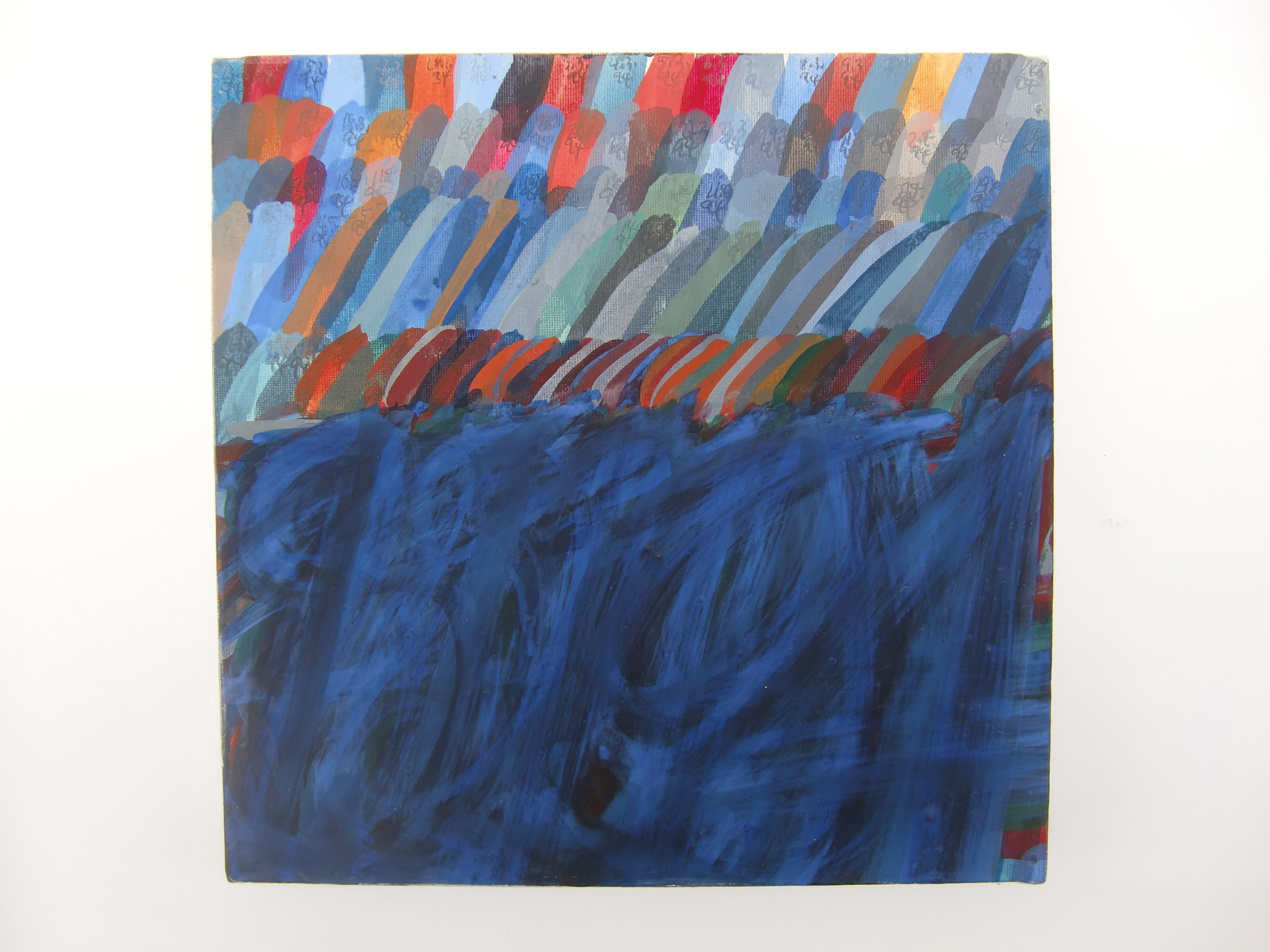 Öl auf Leinwand ohne Titel 1994 - aus dem Jahr 1994 24x24cm